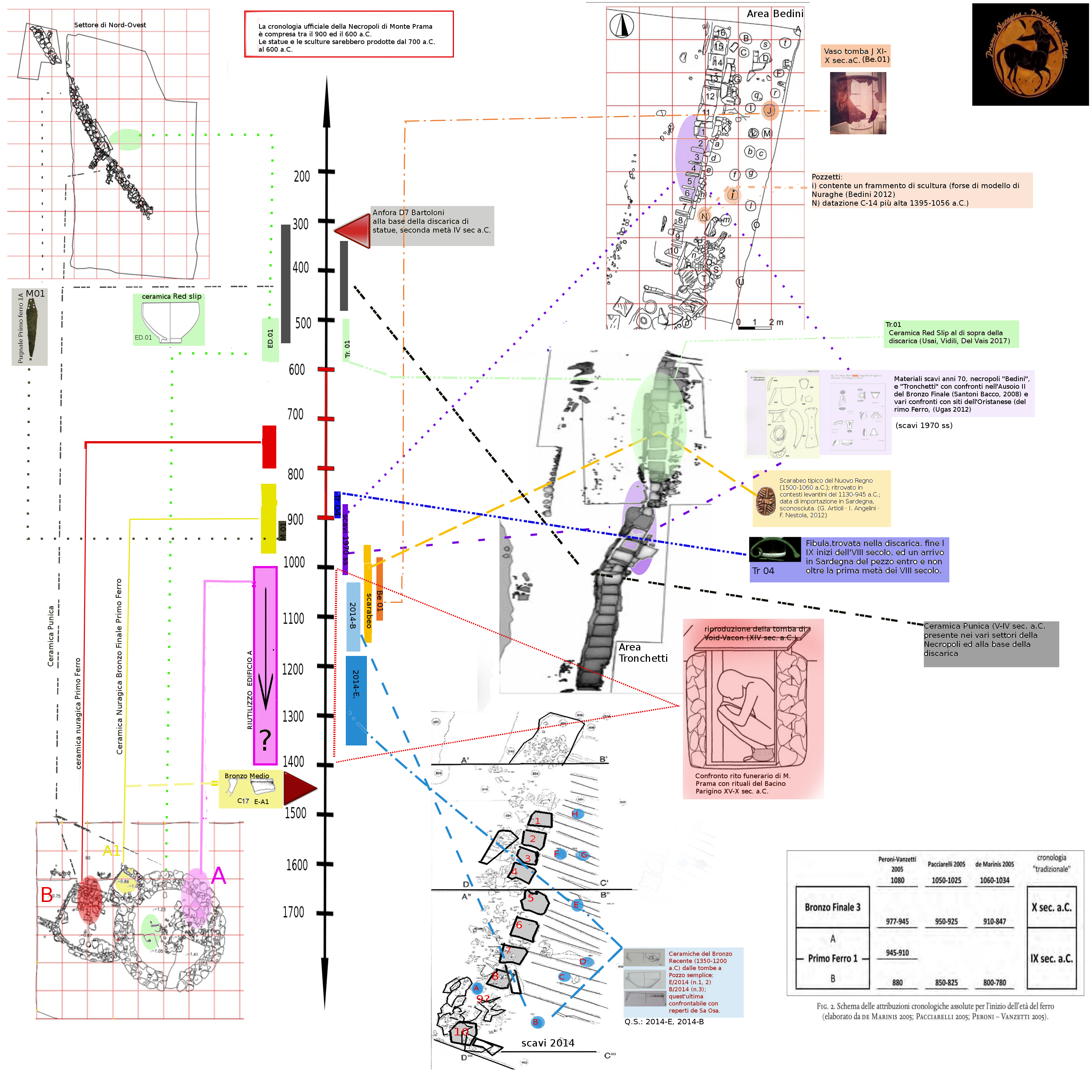 grafico cronologia di monte prama